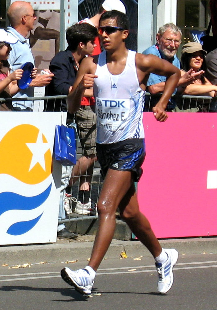 Eder Sánchez, 15.08.2009